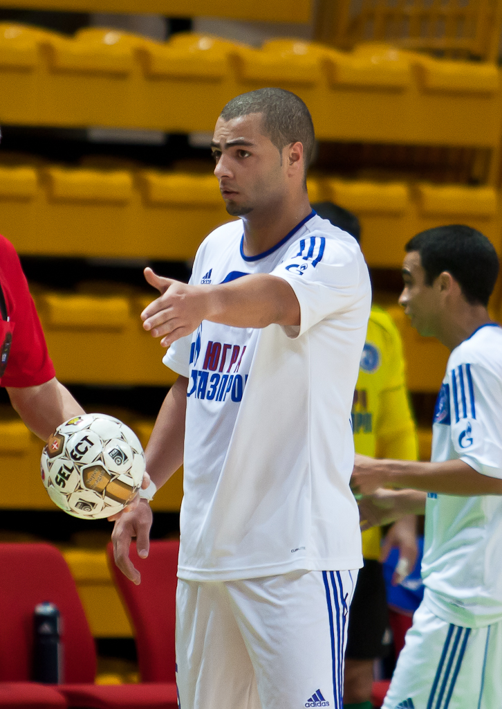 Игрок МФК Газпром-Югра Эдер Лима во время матча Чемпионата России по мини-футболу, Екатеринбург.